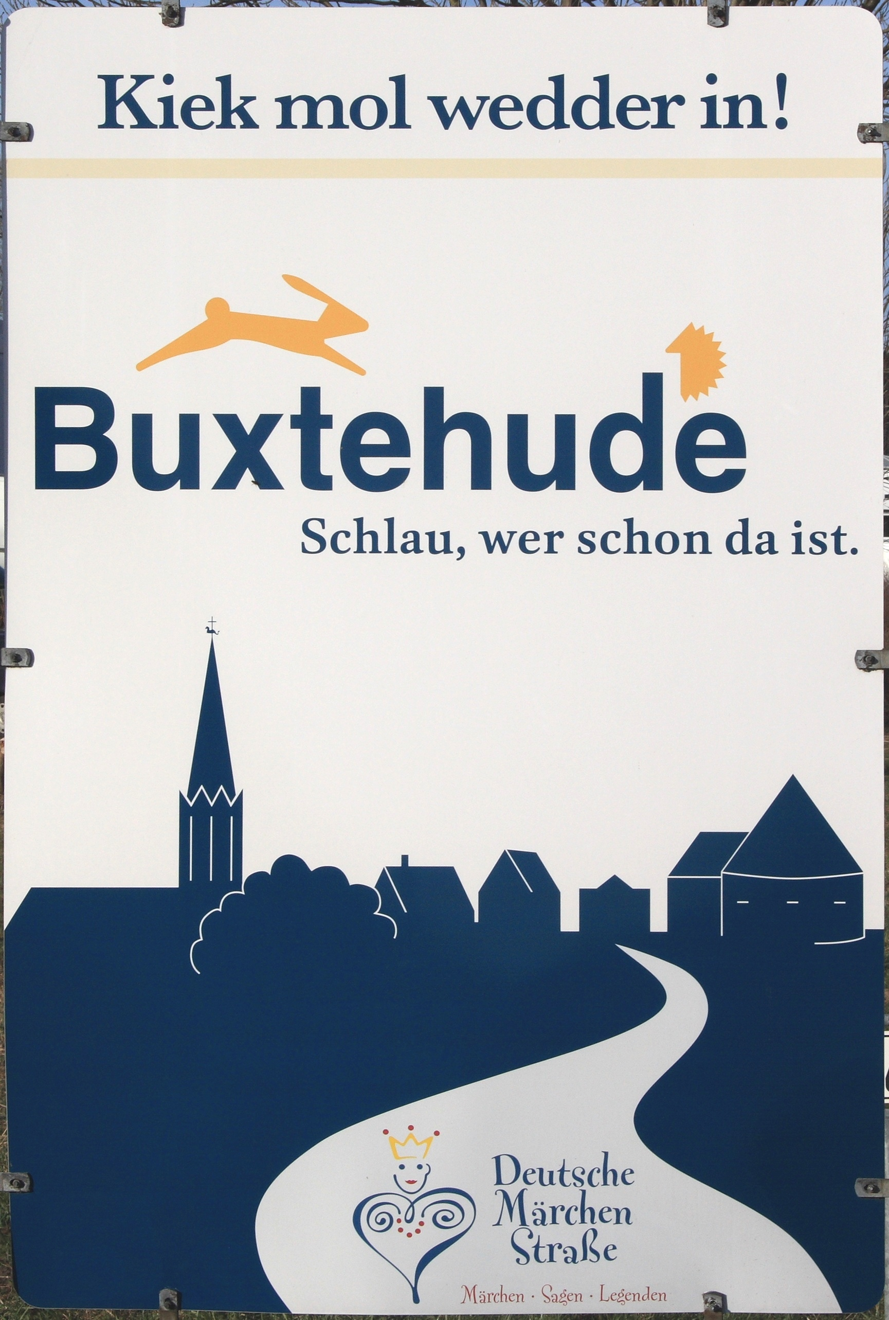 Schild am Ortseingang von Buxtehude mit dem Spruch Schlau, wer schon da ist. in Anlehnung an das Märchen Der Hase und der Igel.